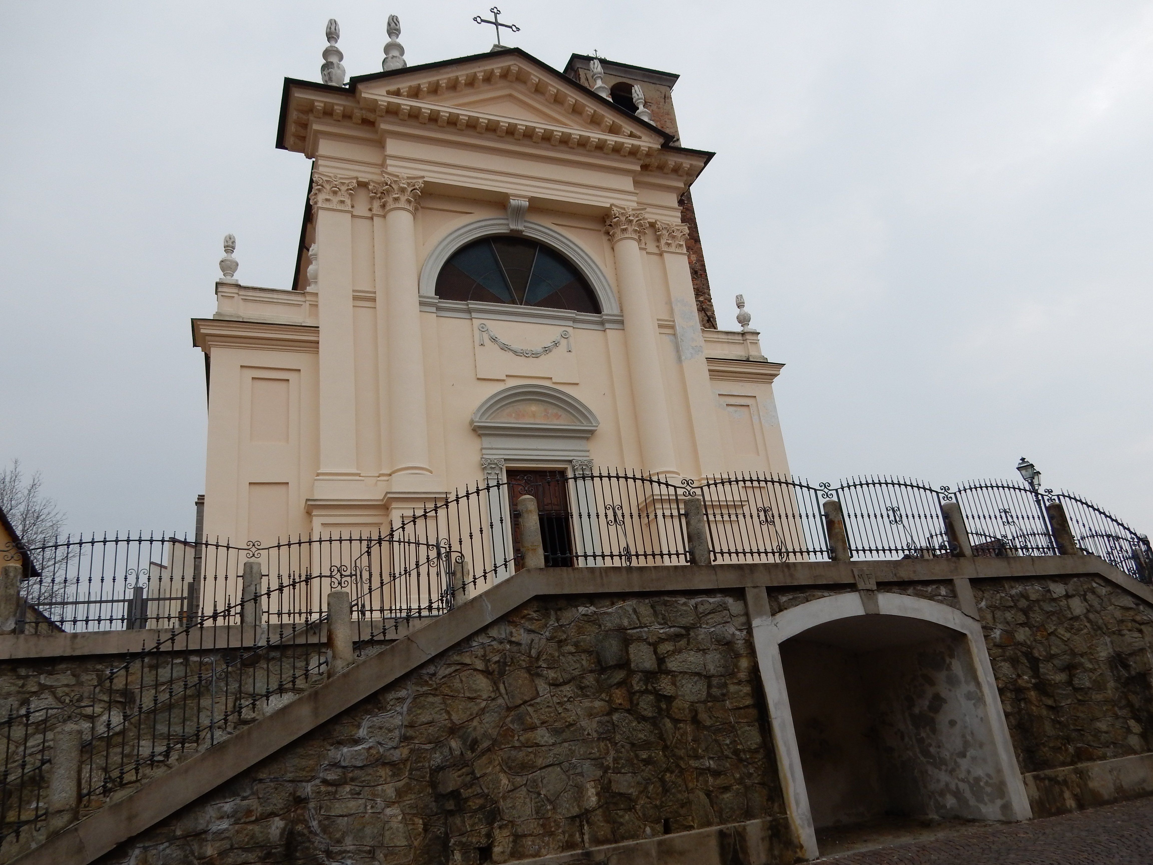 Fiano: chiesa parrocchiale di San Desiderio Martire.